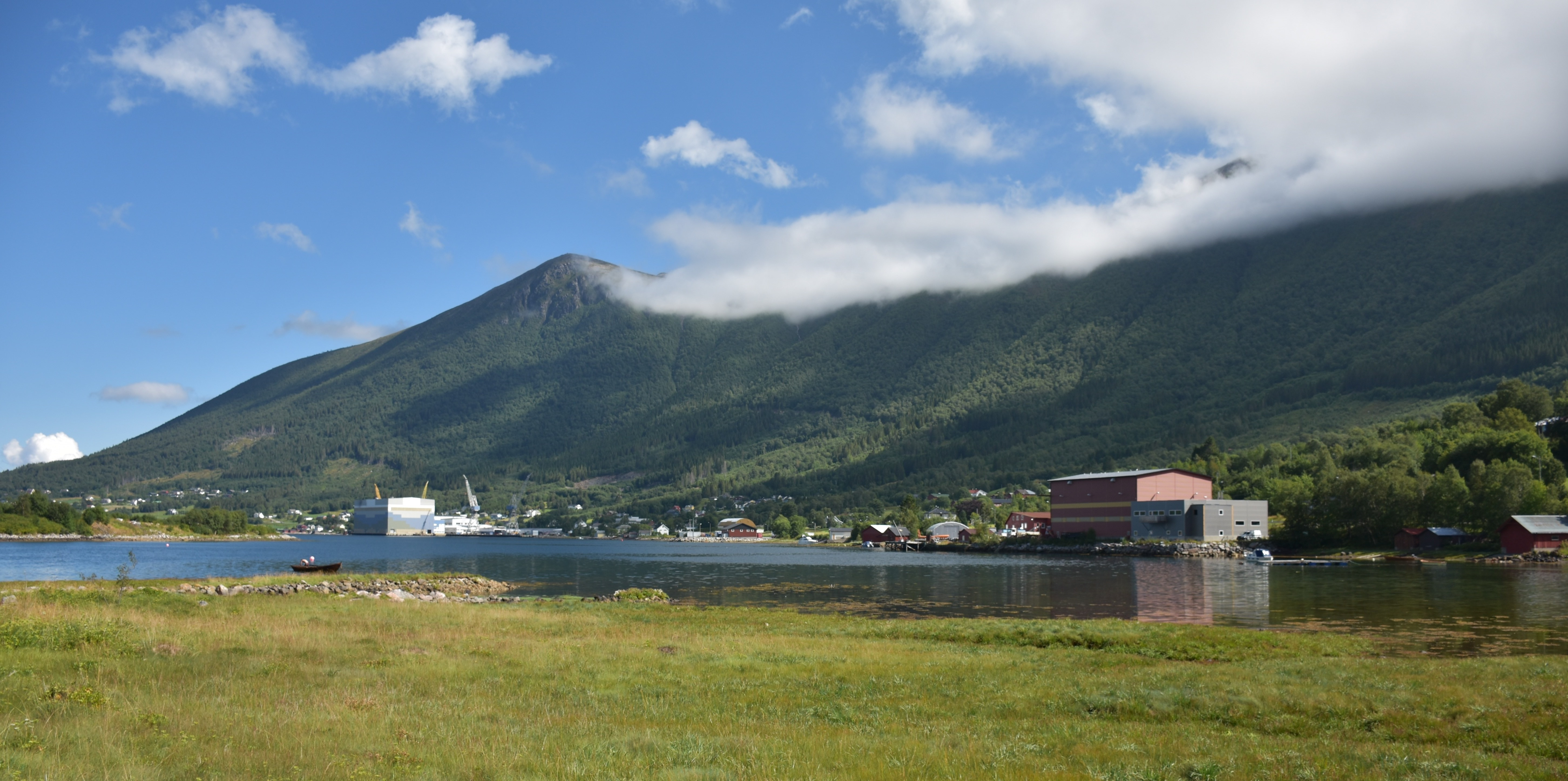 Tomrefjord (Tomra) i Vestnes